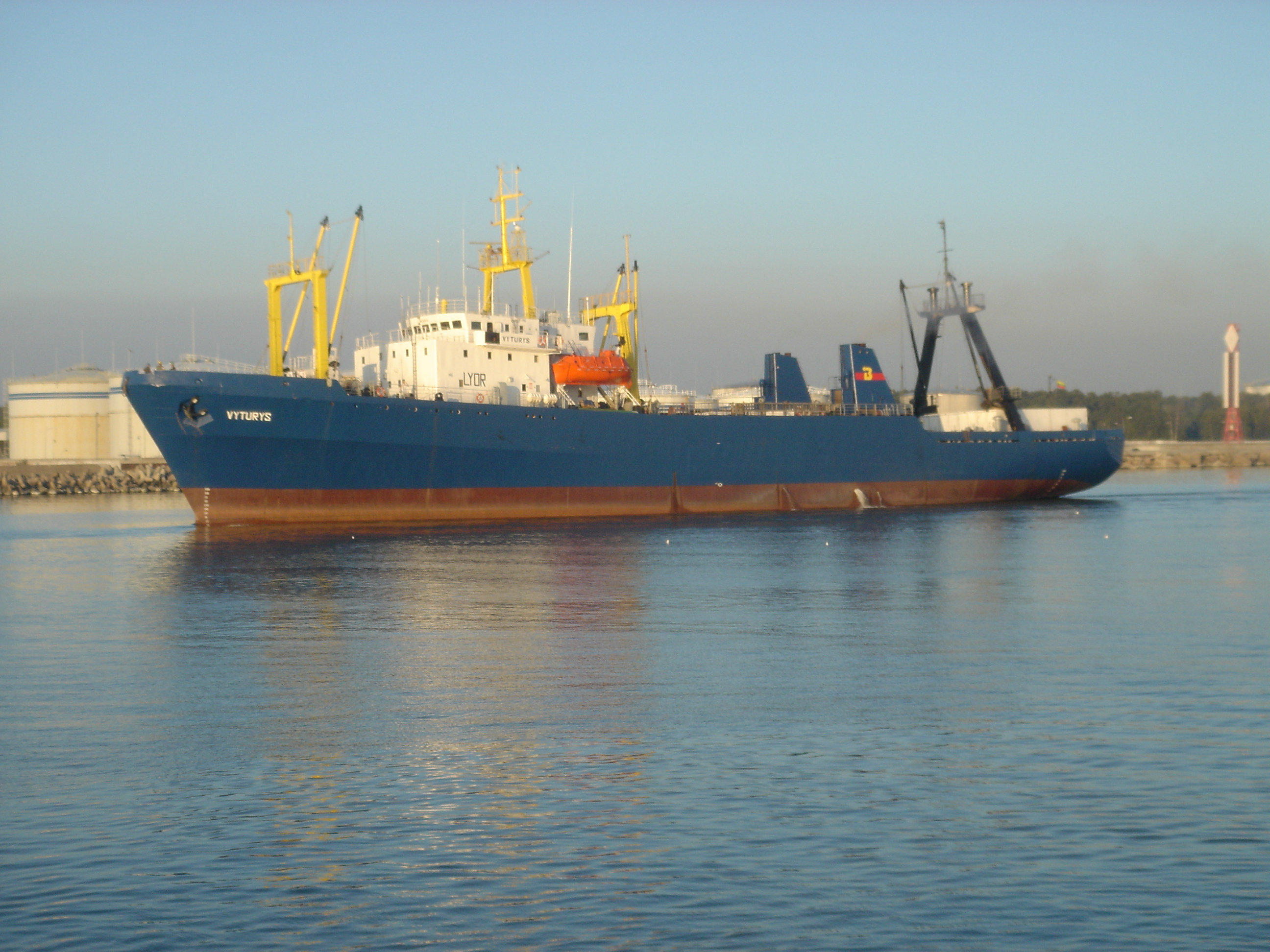 LaimisKLP Žvejybinis traleris-šaldytuvas "Superatlantik" tipo.